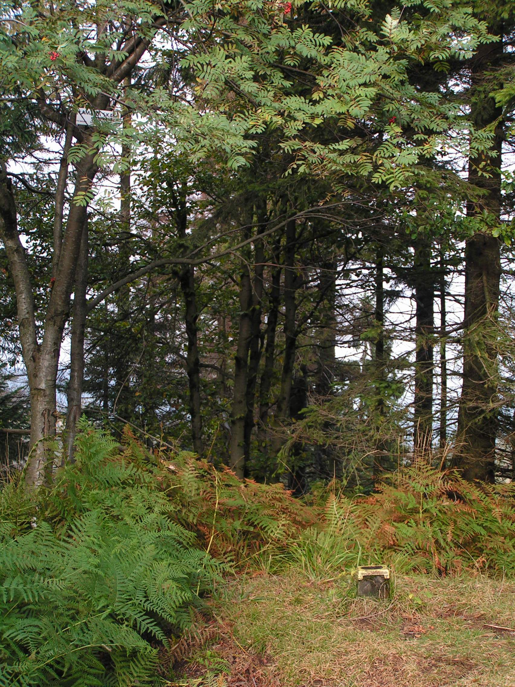 Szczyt Madahory (Łamanej Skały), Beskid Mały, 929 m n.p.m.